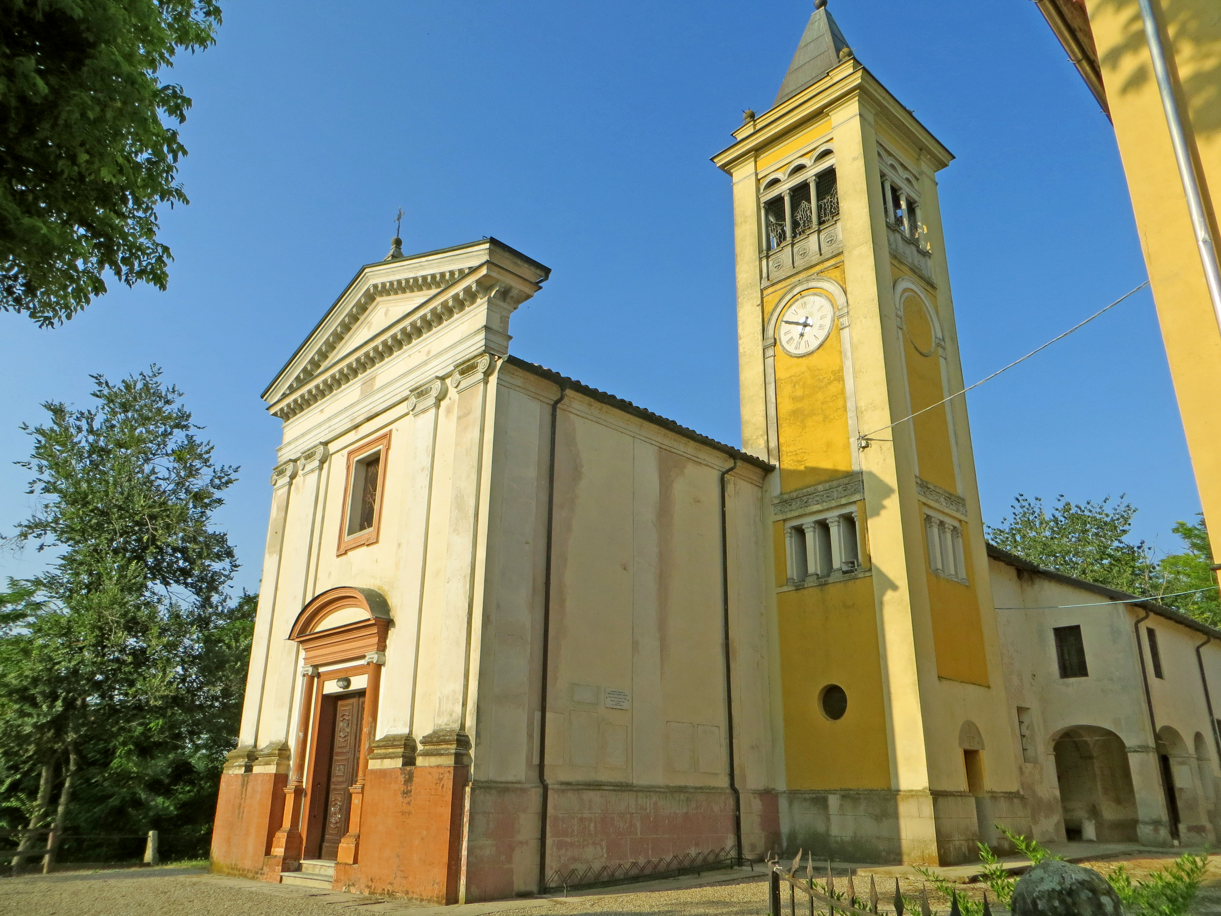 Chiesa della Purificazione di Maria Vergine (Bannone, Traversetolo) - facciata e lato sud